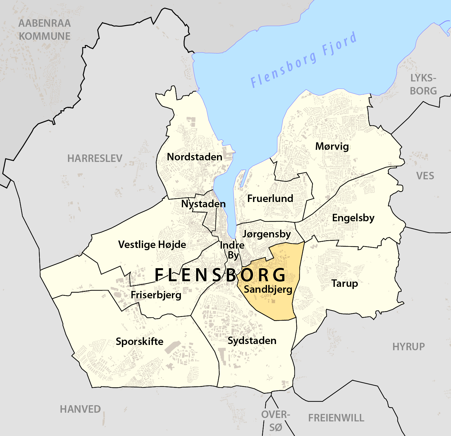 Beliggendhed af Sandbjerg i Flensborg Kommune